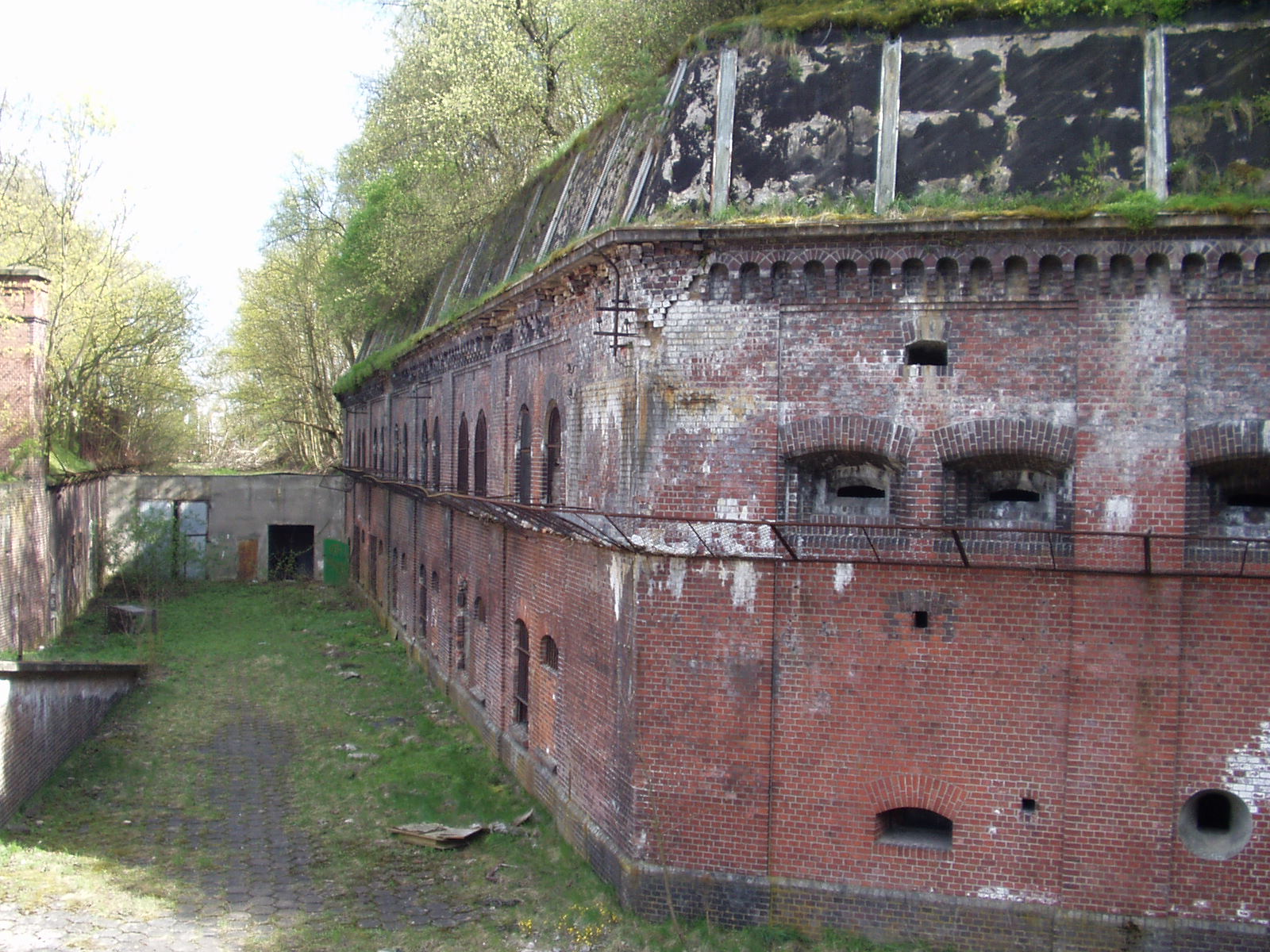 Lewa strona koszar szyjowych Fortu XI Twierdzy Toruń